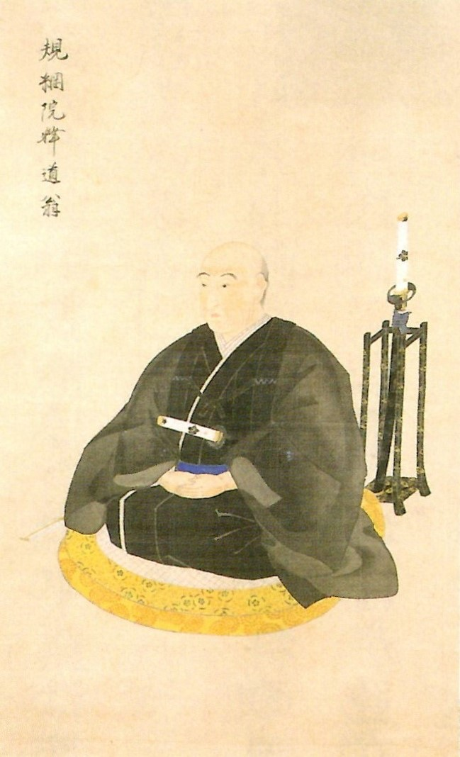 渡辺規綱の肖像。